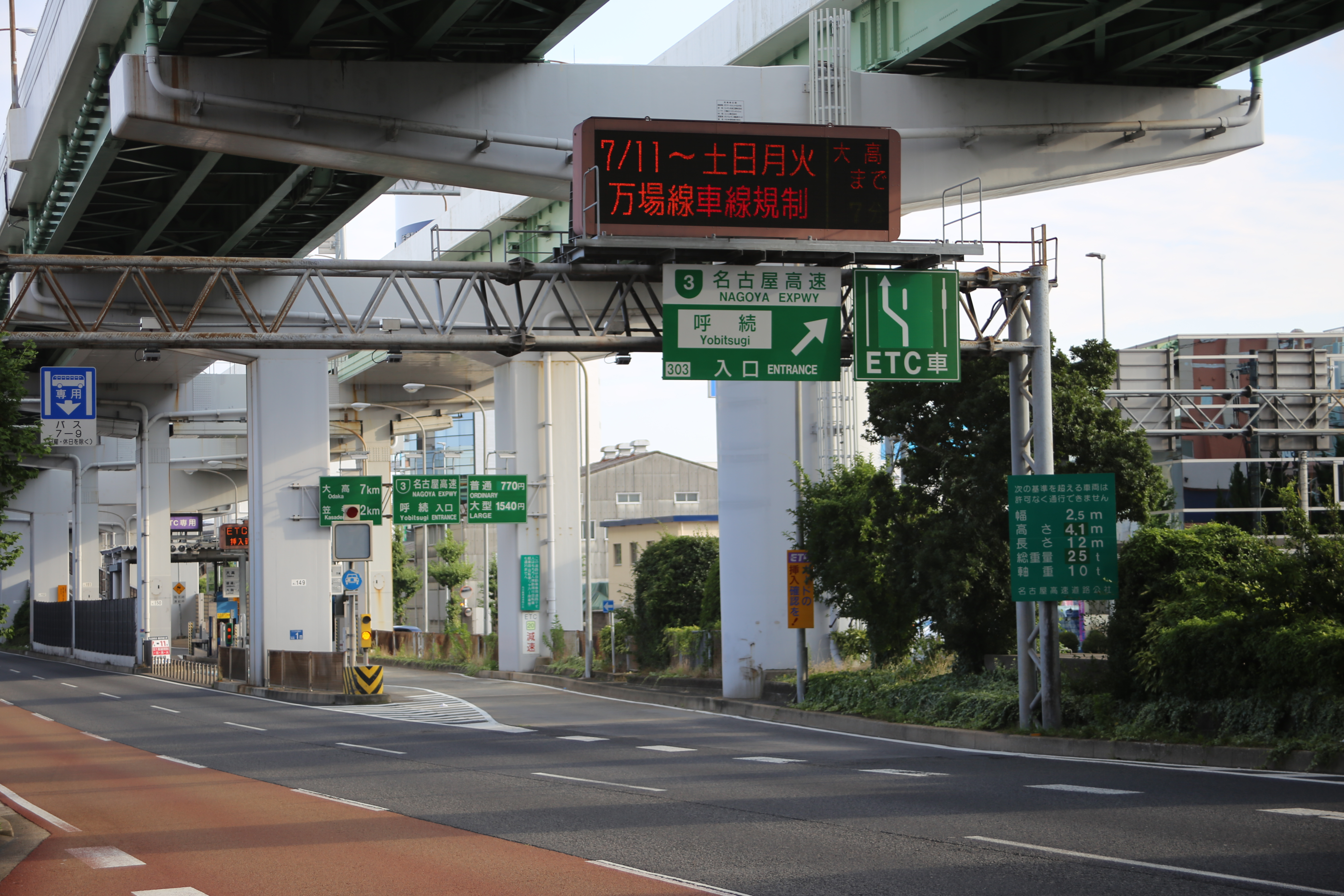 名古屋市南区千竈通1丁目の名古屋高速道路3号大高線の呼続入口を北東側より撮影